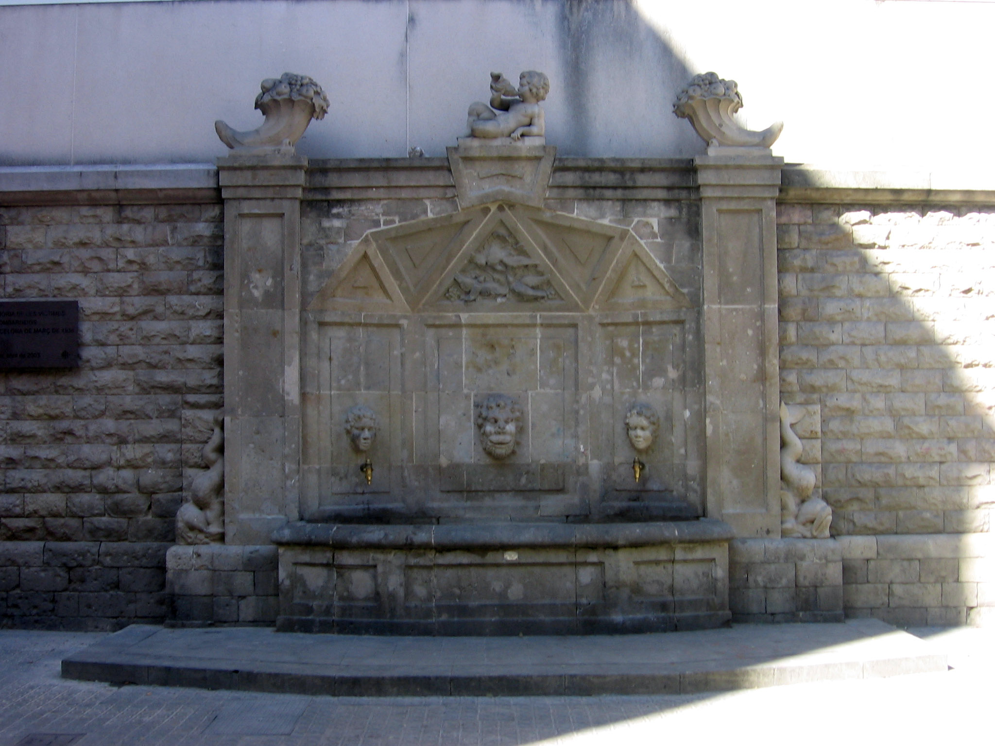 Fuente del Carmen (1931), de Josep Goday, plaza de Joan Amades.